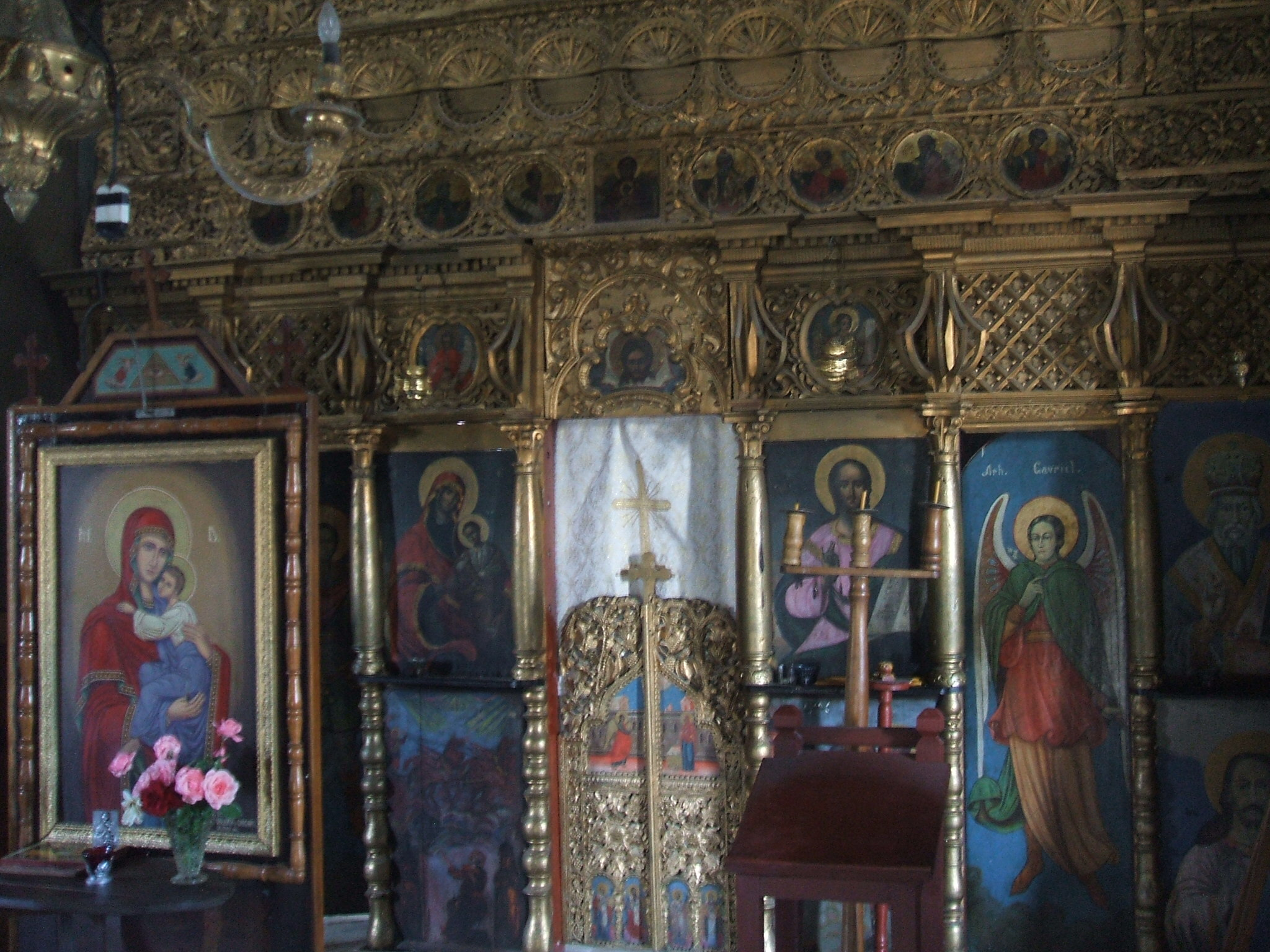 Biserica "Sfantul Ierarh Nicolae" din Rasa, construita intre 1936-1937 pe acelasi amplasament cu o biserica mai veche, din secolul XIX, de la care a preluat catapeteasma.